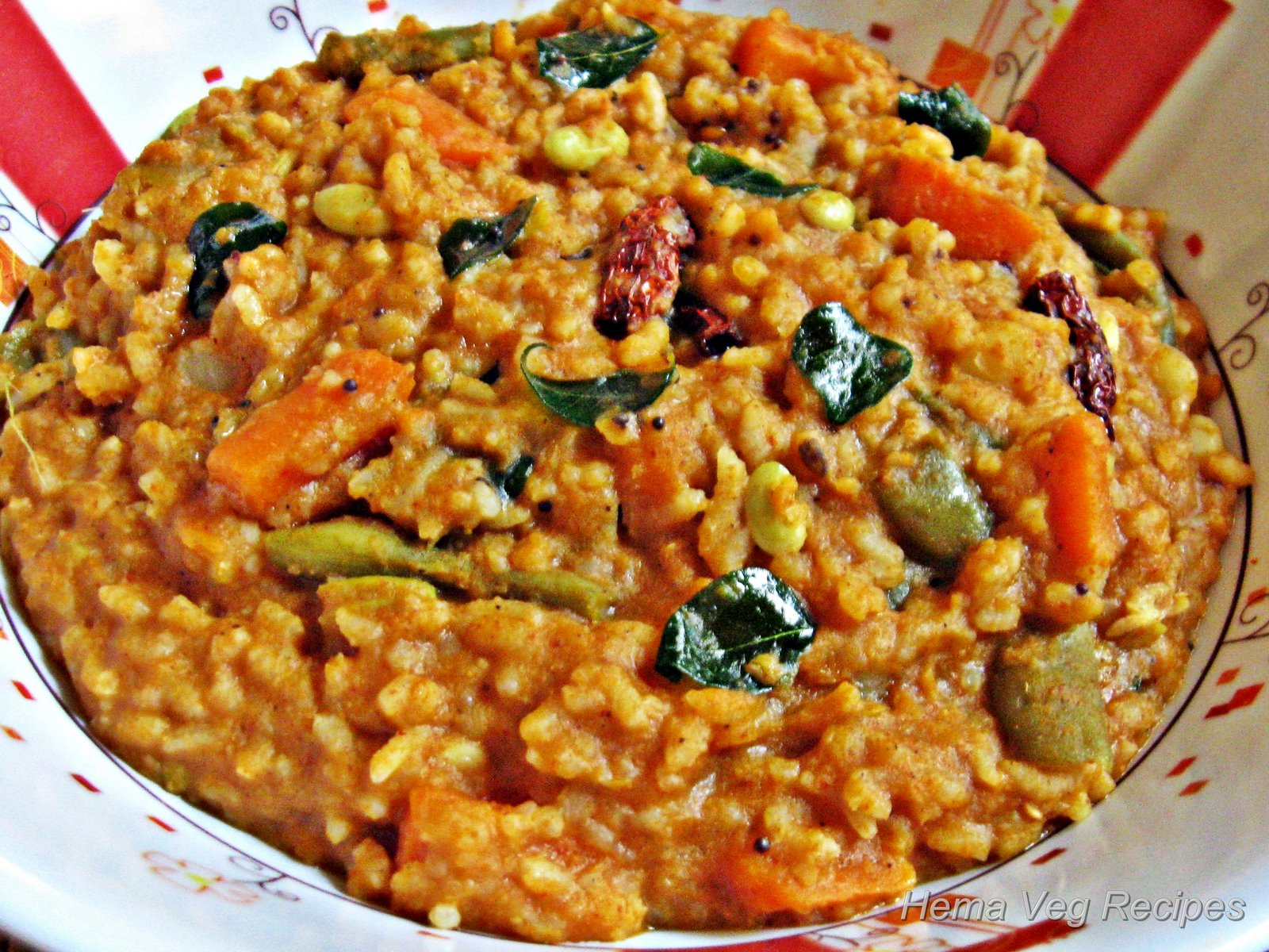 ಕನ್ನಡ: bisi bele bath